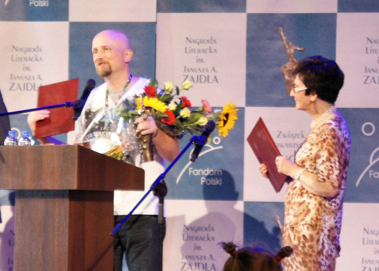 Robert M. Wegner i Jadwiga Zajdel na gali rozdania nagród im. Janusza A. Zajdla, Polcon 2013, Warszawa